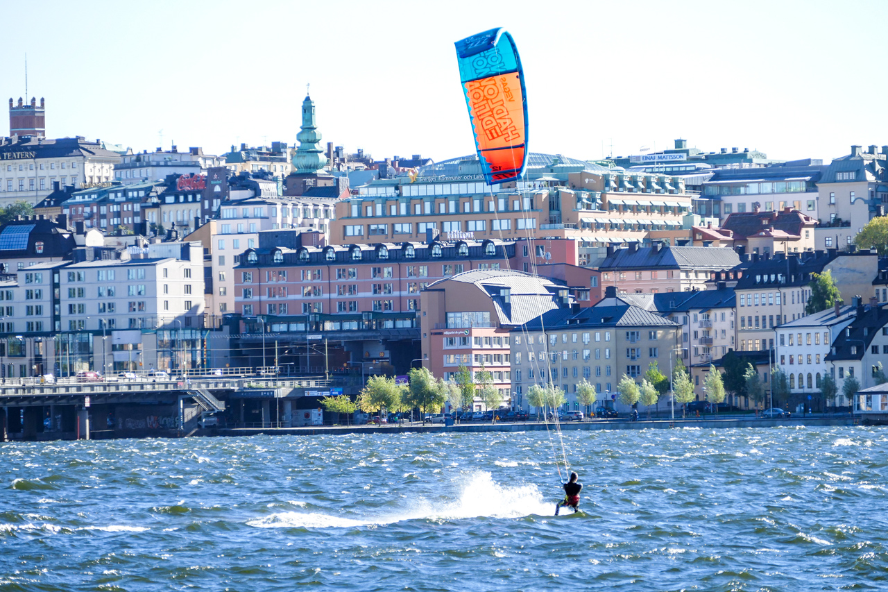 Anton kitesurfar på Riddarfjärden. Vi startade från Stadshusets gräsmatta vilket inte var helt uppskattat.